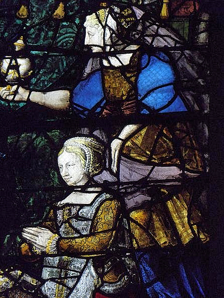 Madeleine de Savoie-Villars (1510-1586) présentée par Sainte-Marie-Madeleine. Détail d'un vitrail de l'église Saint-Acceul d'Écouen (95).